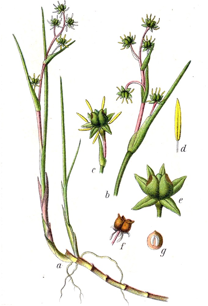 Scheuchzeria palustris L., syn. Scheuchzeria generalis E.H.L.Krause Original Caption Scheuchzerie, Scheuchzeria generalis